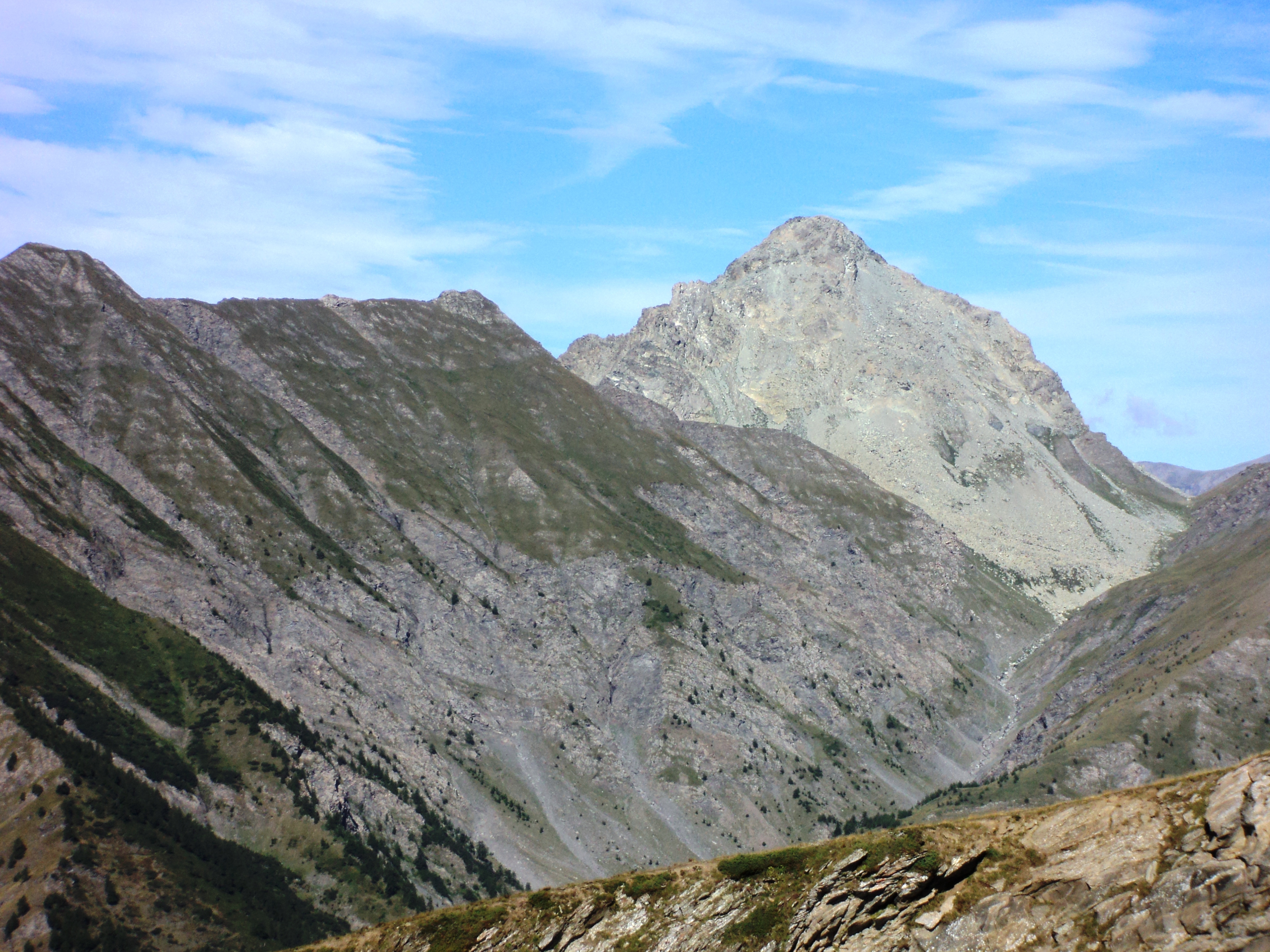 Il monte Palavas dal colle Barant. Sulla destra del monte si note il colle dell'Urina